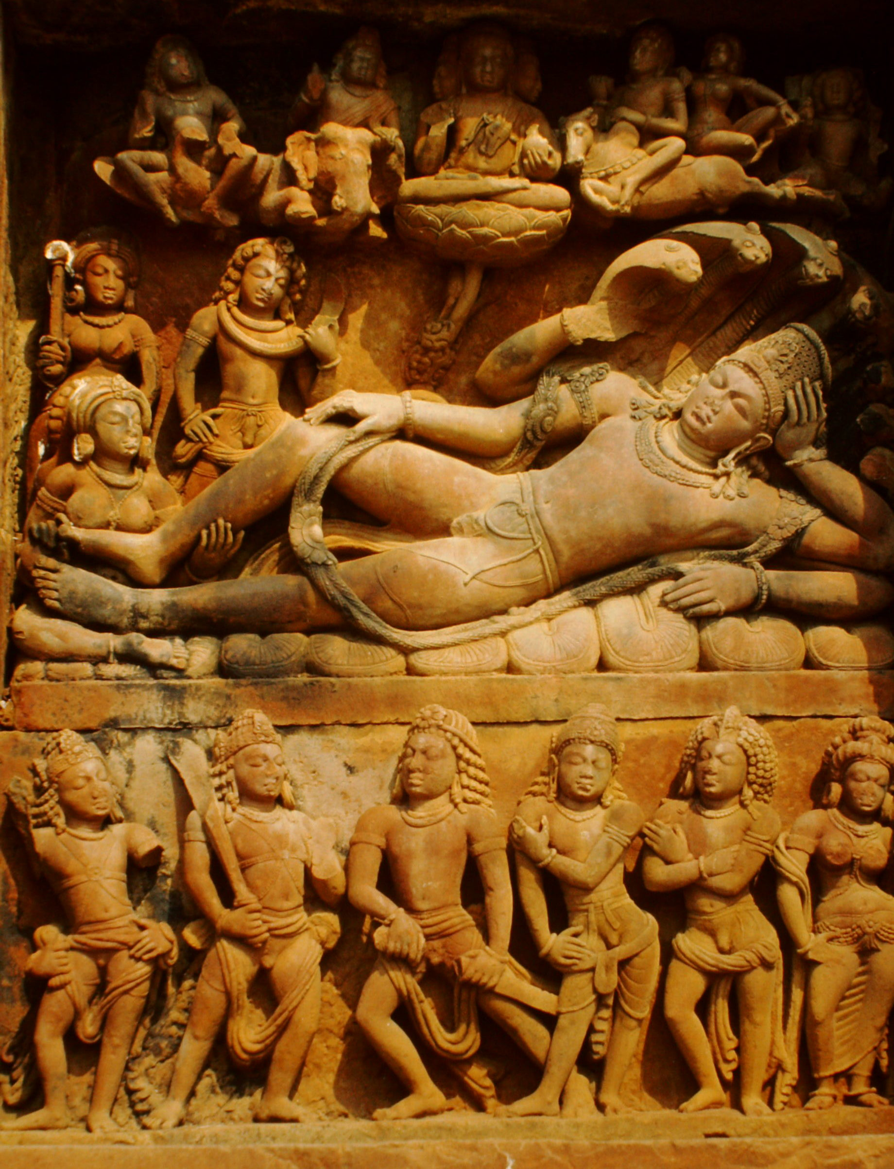 Deogarh, Dasavatara-Tempel, Vishnu